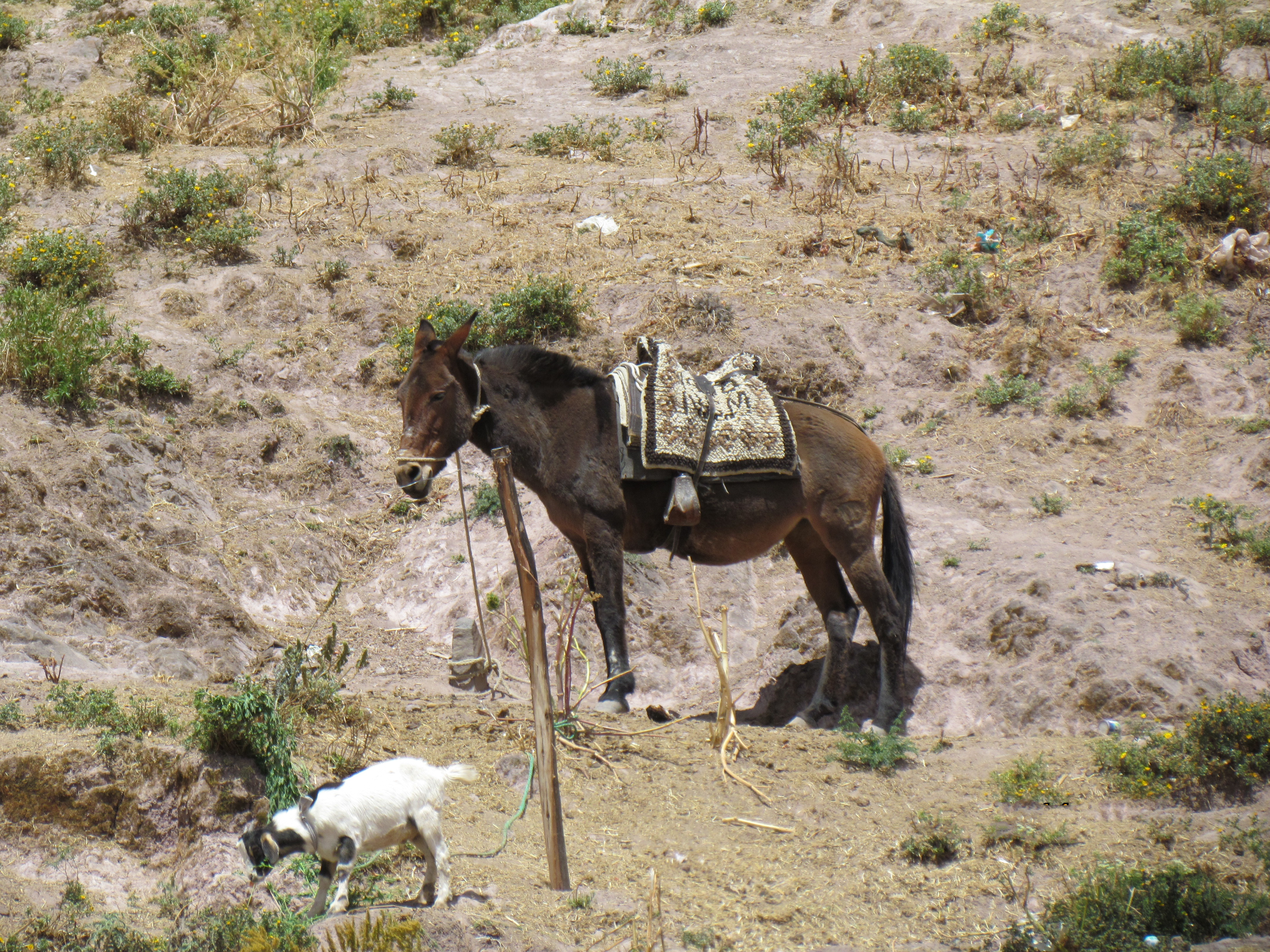 Asemila de los Arrieros Aurahuinos